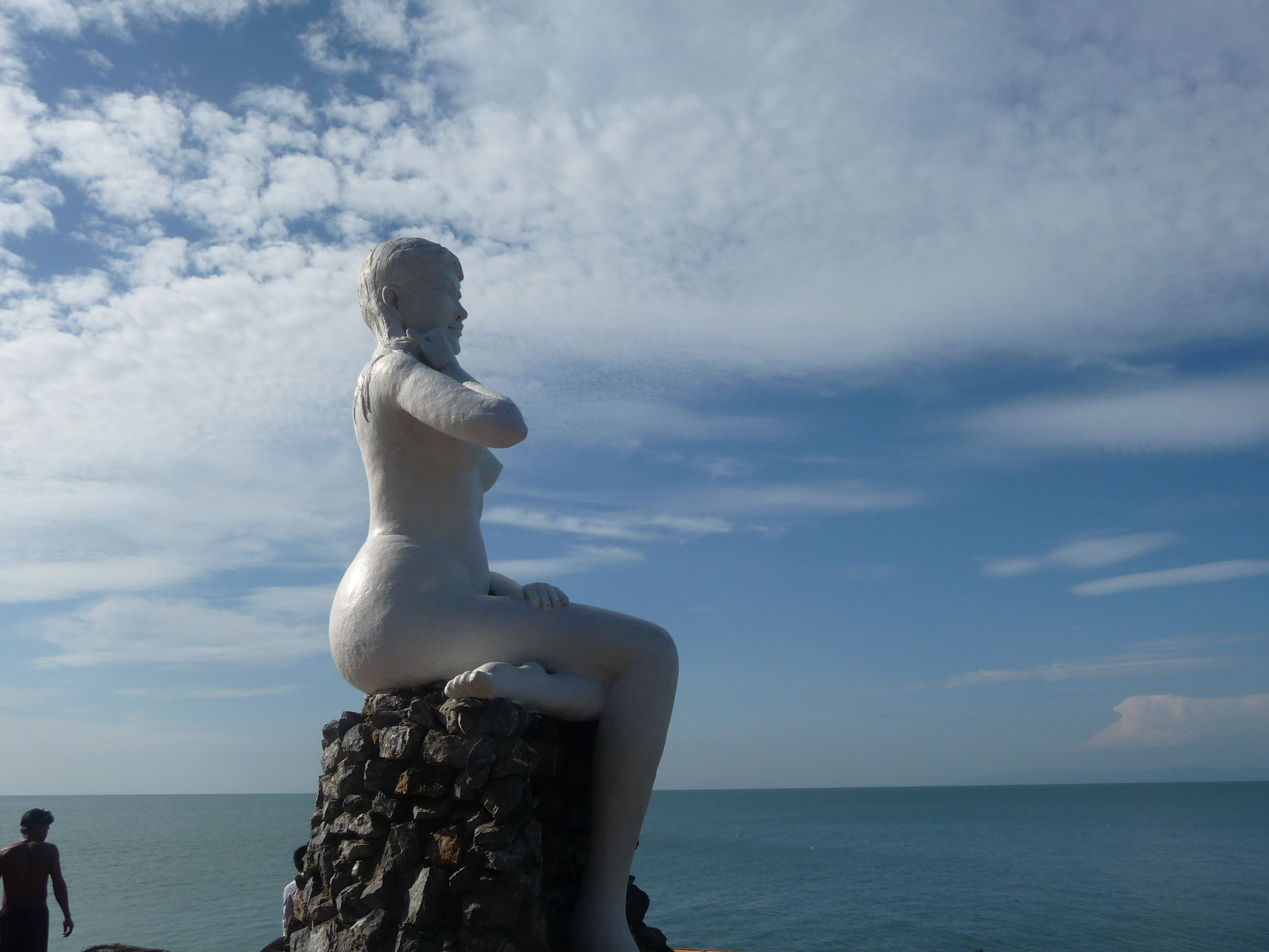 statue de la femme de pêcheur dénudée